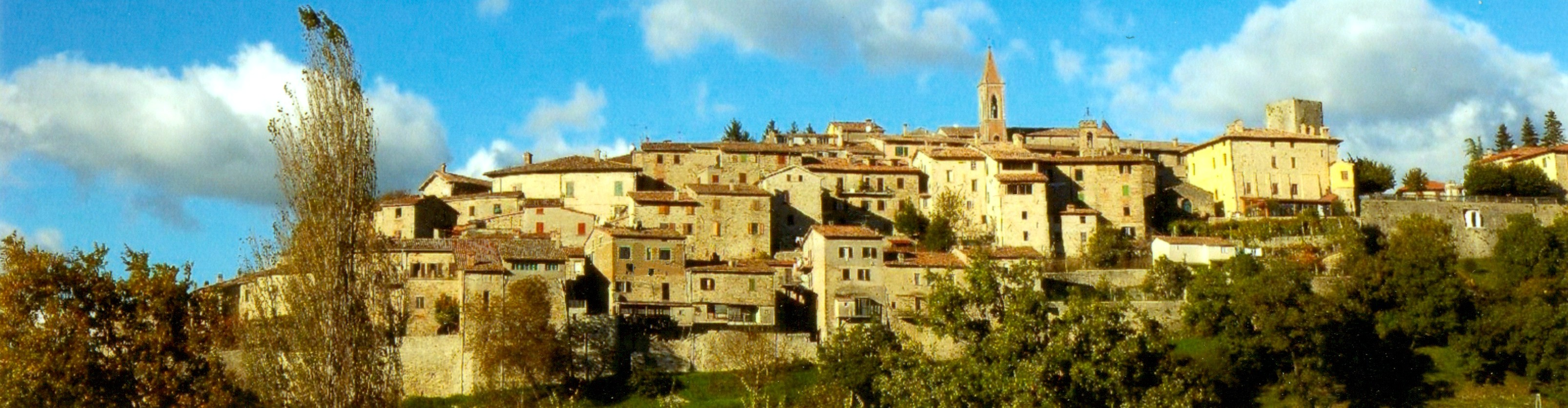 Panorama Pietralunga Ombrie